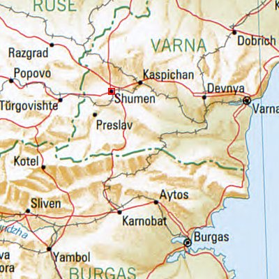 Schumen - Lage des Ortes in Bulgarien